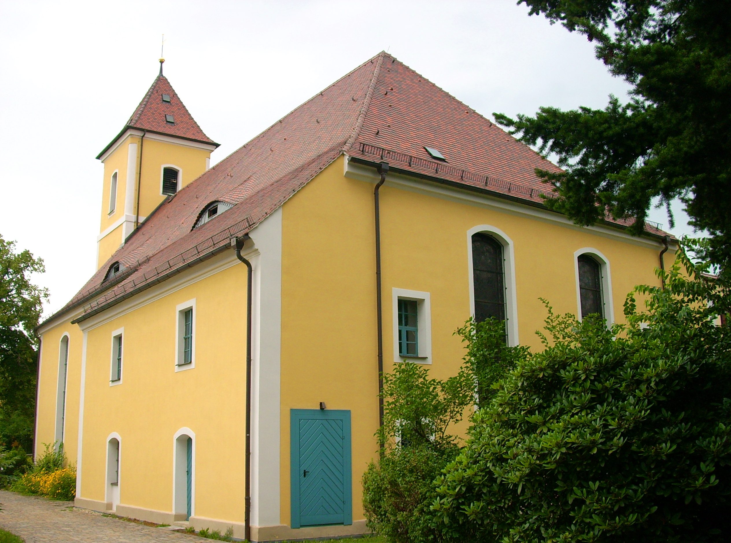 Kirche in Lohsa